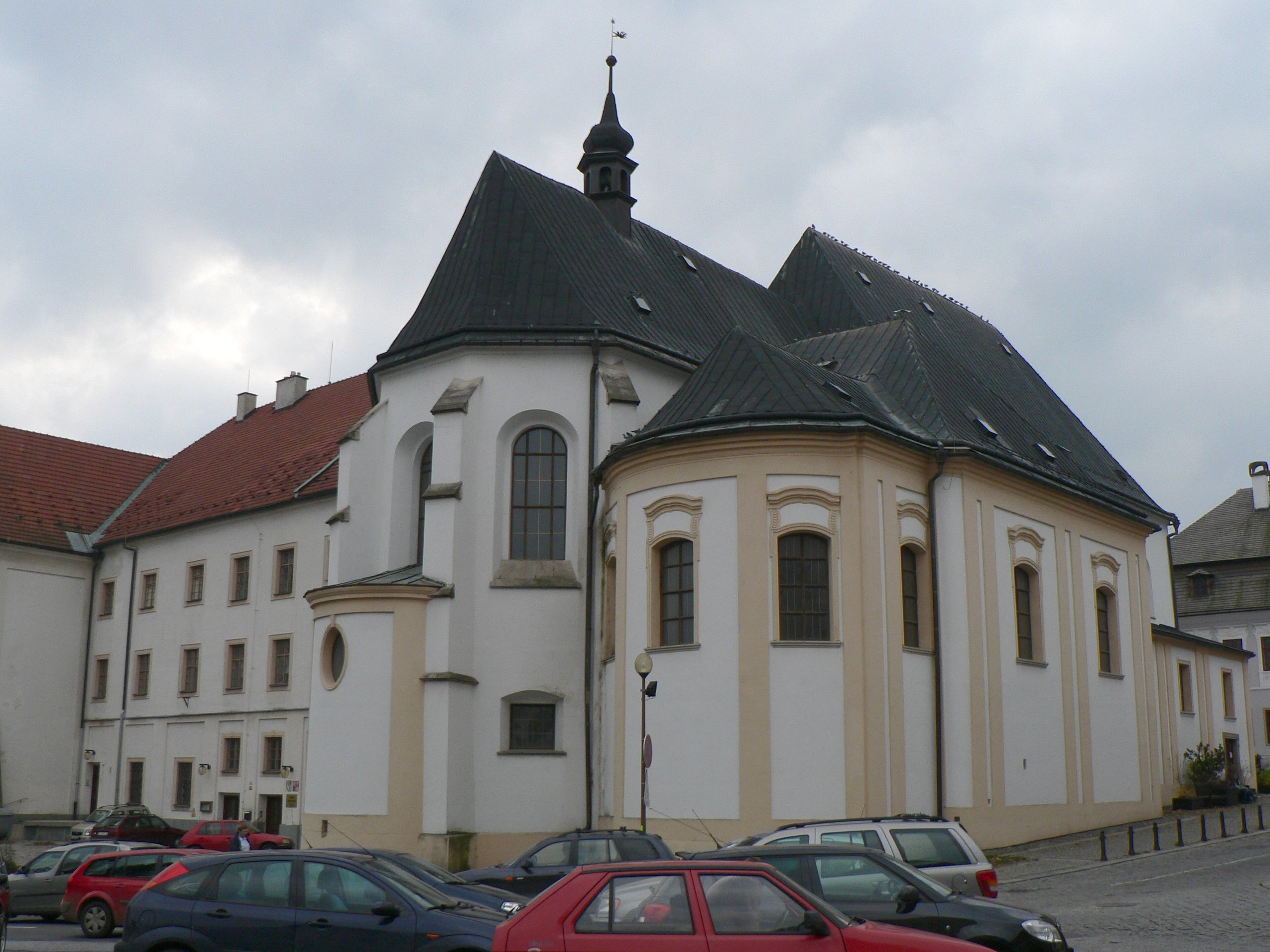 Šumperk, klášterní kostel